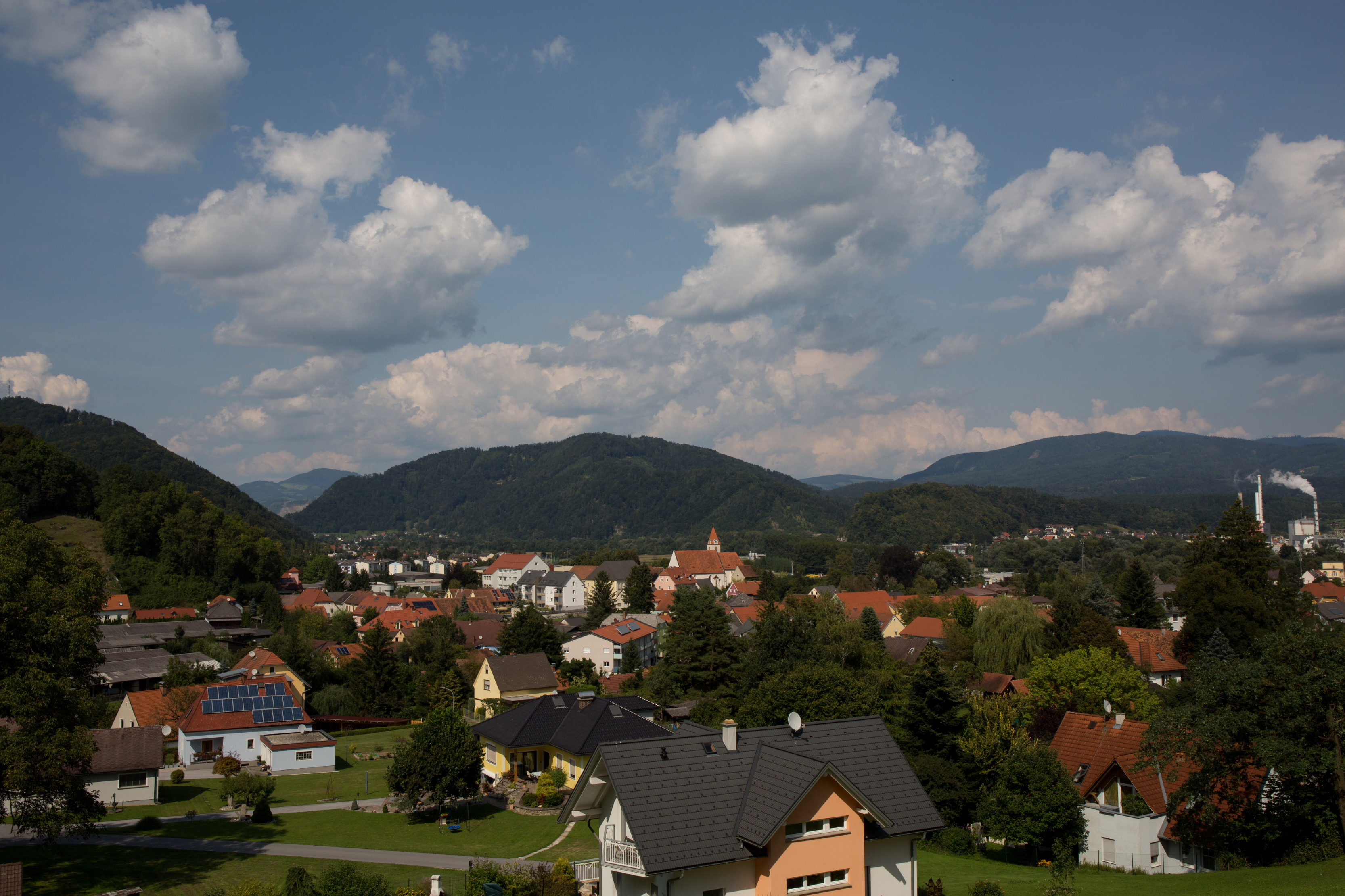 Gratwein bei Graz, Steiermark, Austria